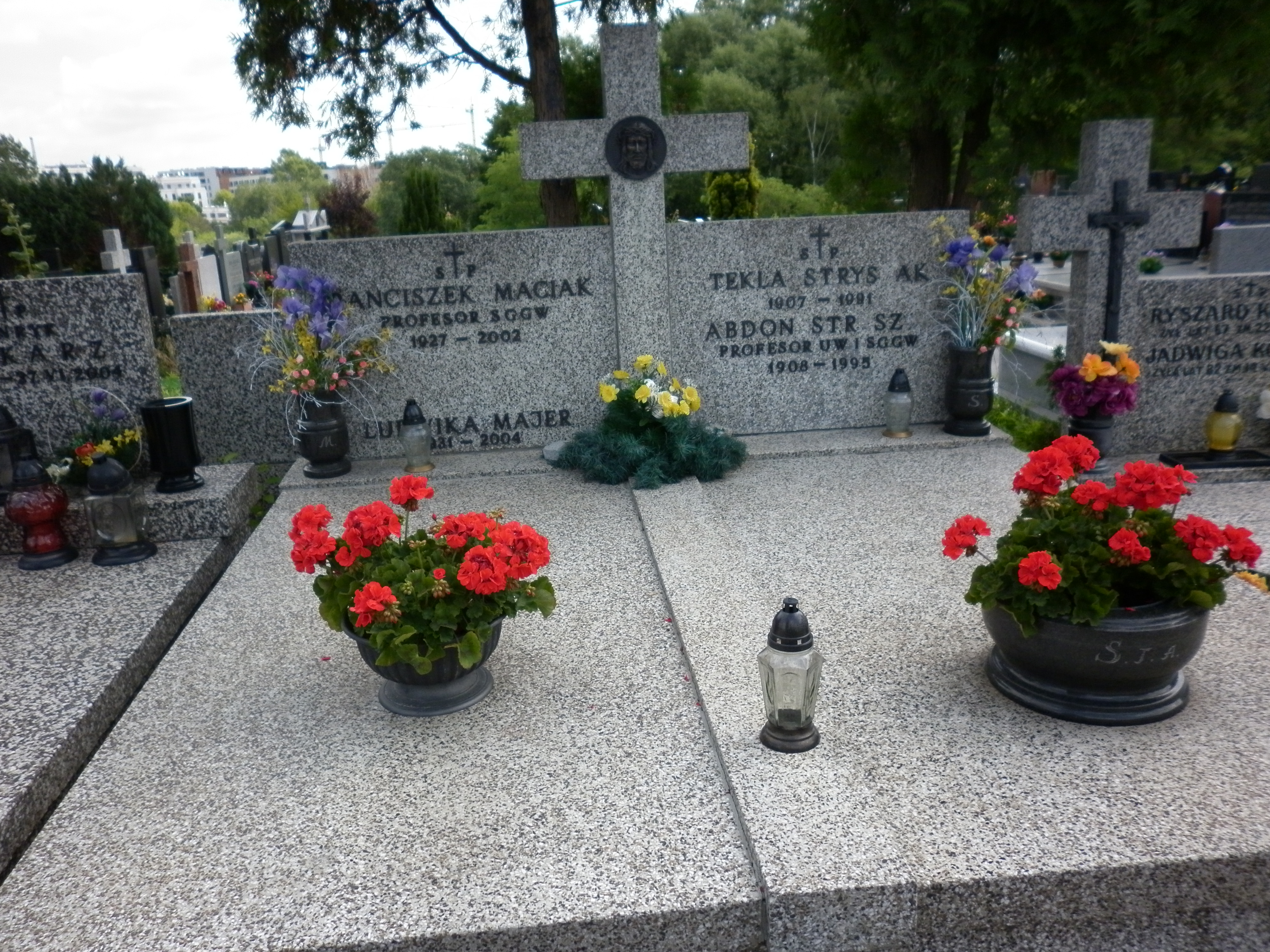 Grób Abdona Stryszaka i Franciszka Maciaka| na cmentarzu przy ulicy Renety